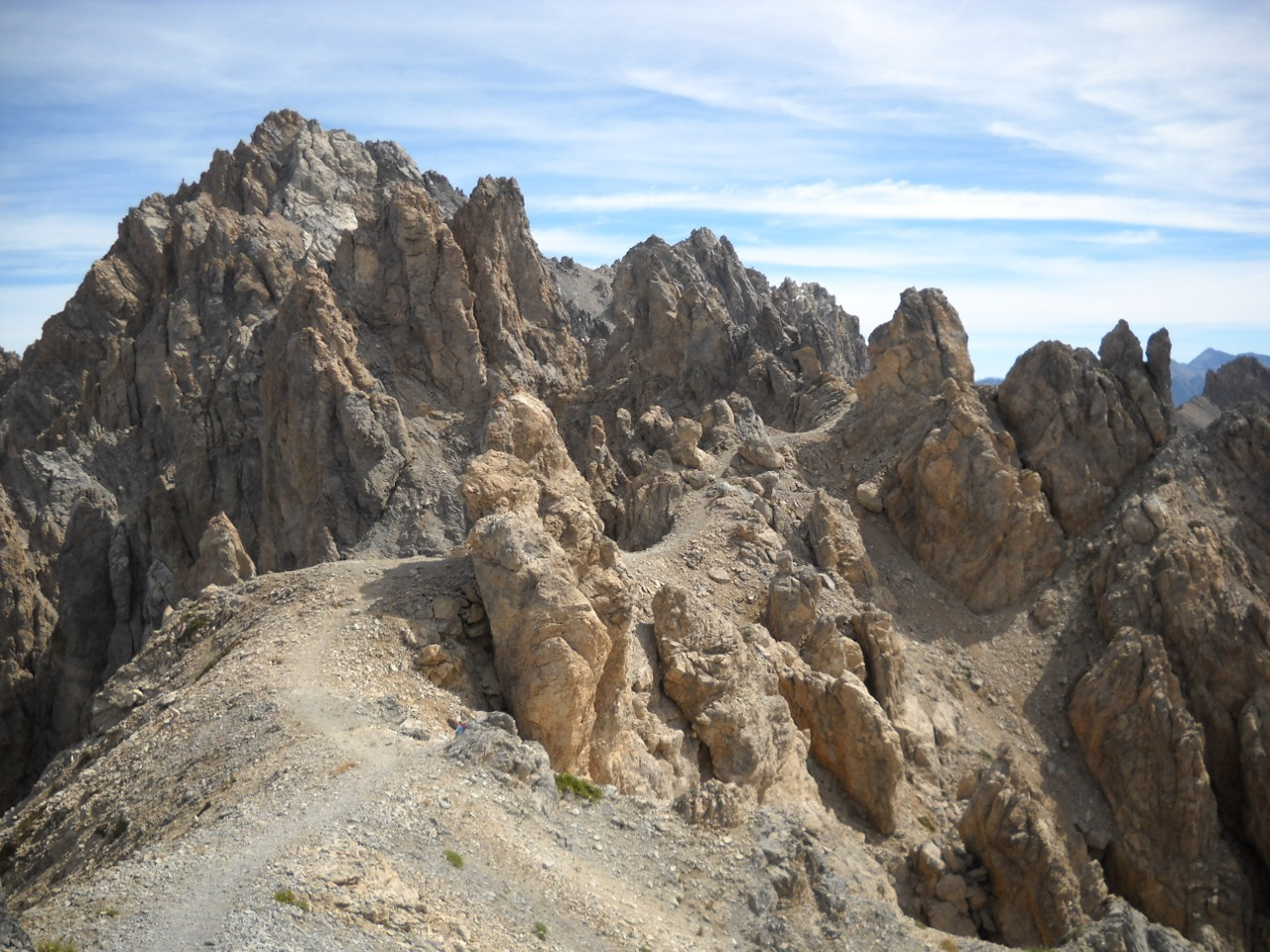 Un passaggio della quarta tappa del sentiero Roberto Cavallero: colletto a quota 2603 tra il monte Scaletta ed il passo Peroni